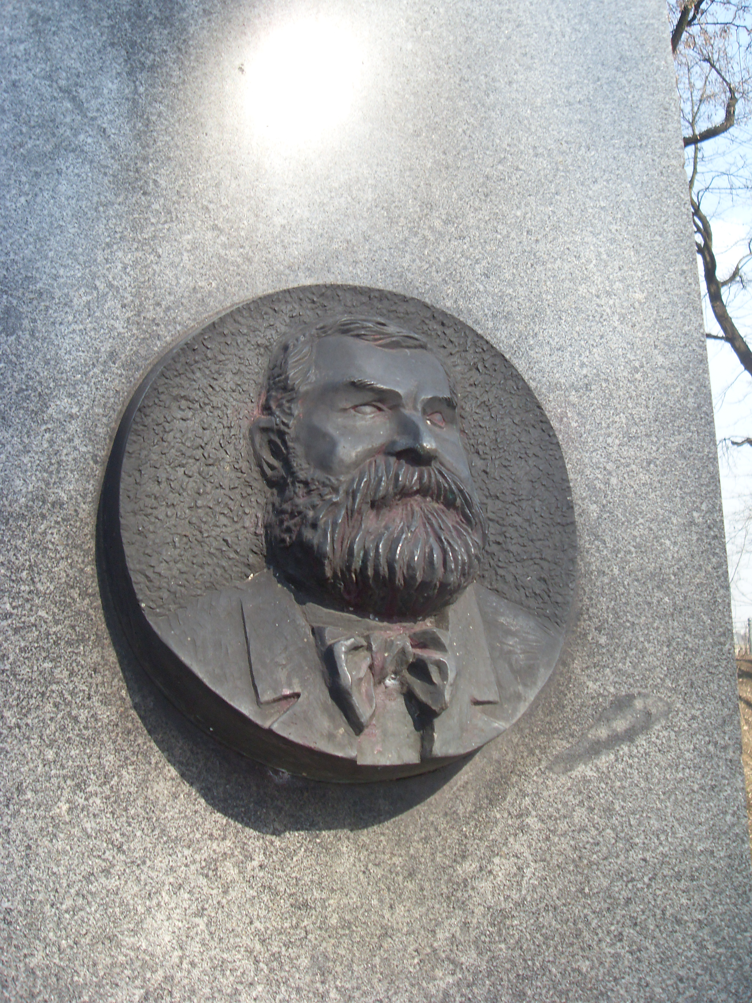 Fragment pomnika Maksymiliana Nowickiego - wskrzesiciela krajowego rybactwa z 1898 r., Kraków - Planty im. Floriana Nowackiego w Krakowie.